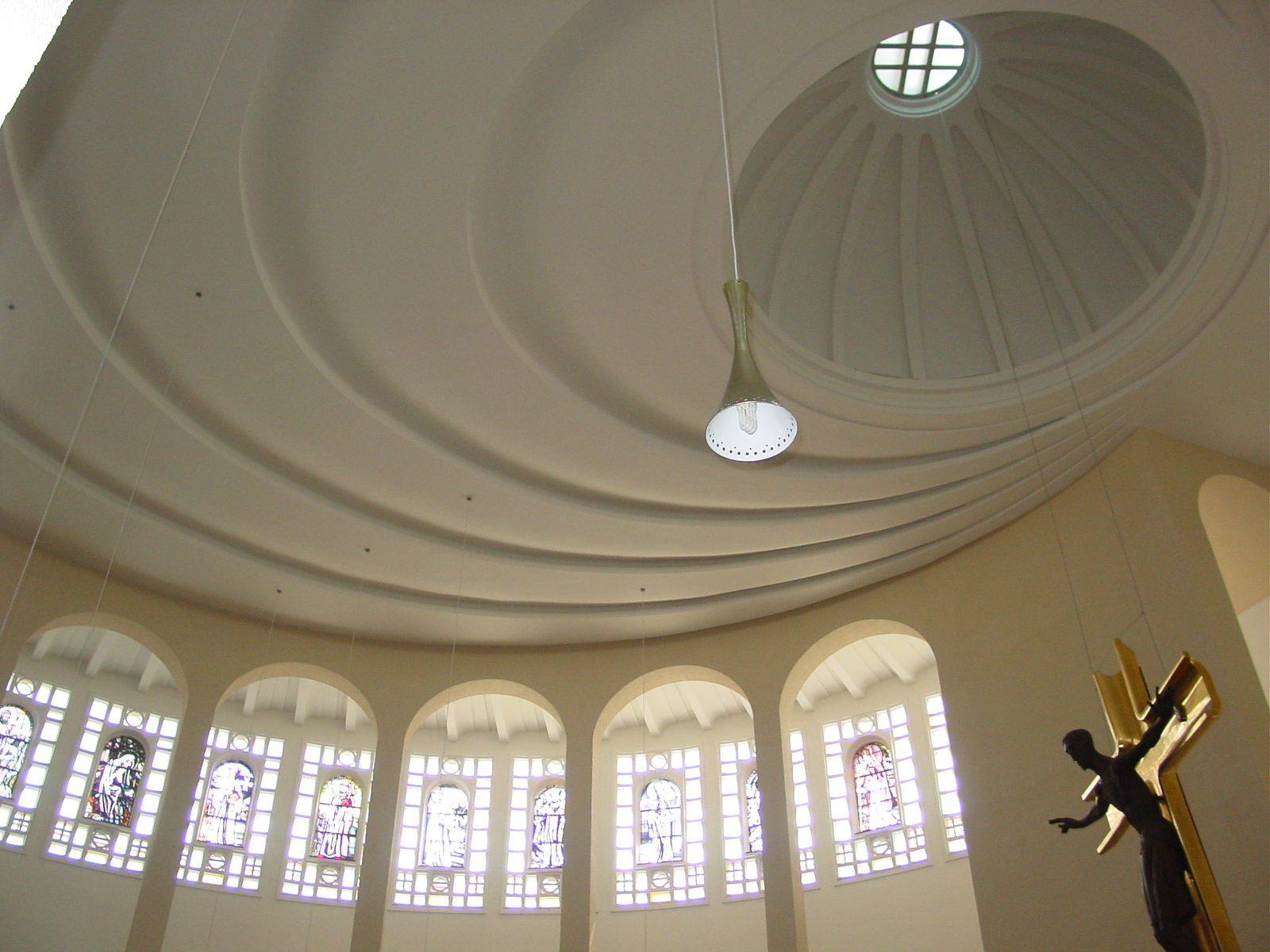 Decke der Pfarrkirche Liesing (Wien 23)